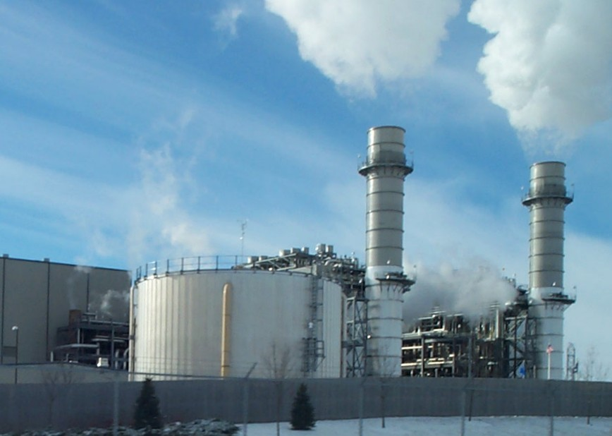 Riverside Energy Center